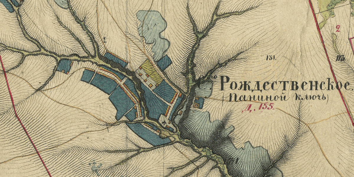 Село Рождественское (Паниной ключъ) на одноверстной карте Менде Симбирской губернии 1861 г.